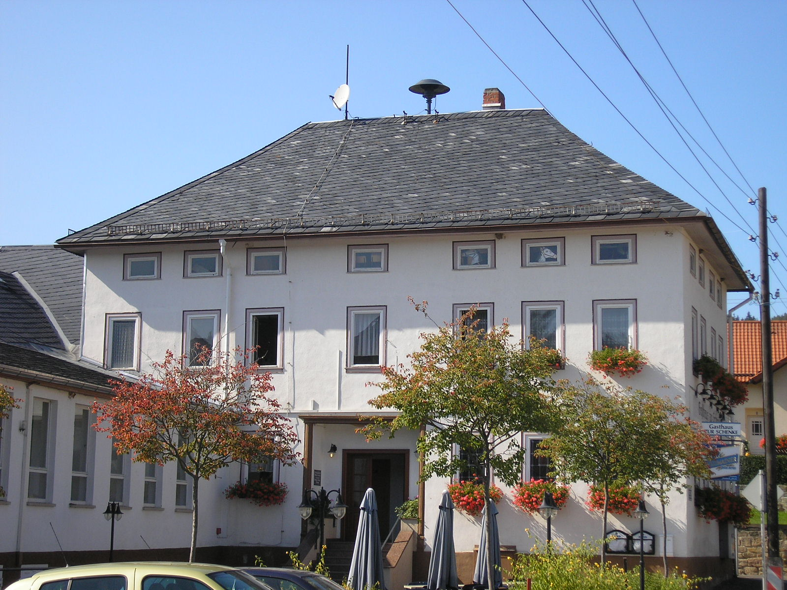 Das ehemalige Gemeindeverwaltungsgebäude in Heyda bei Ilmenau (Thüringen, Deutschland).